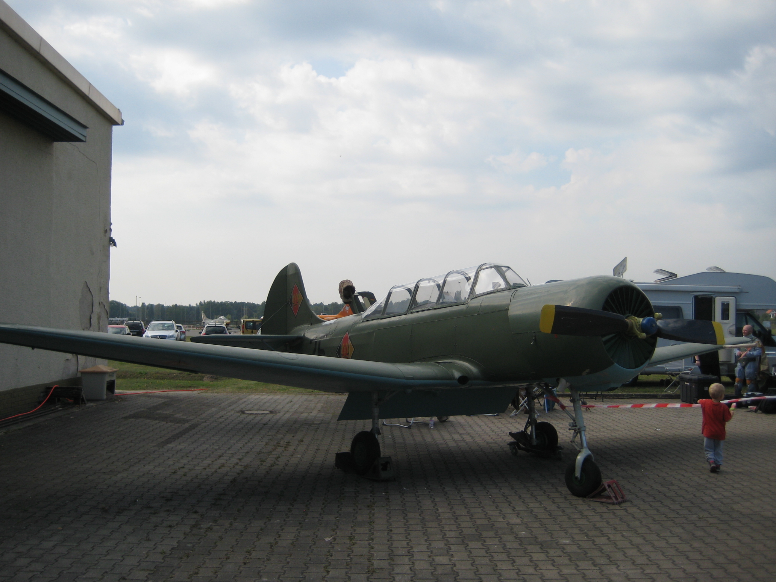 Luftwaffenmueum Gatow